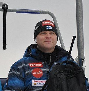 Pekka Niemelä podczas konkursu drużynowego mężczyzn na skoczni normalnej podczas Mistrzostw Świata w Narciarstwie Klasycznym 2011 w Oslo.